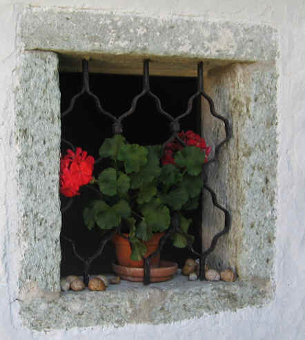 Quelle: eigene Aufnahme 19 08 2005 Fotograf: Janez Novak, Ljubljana, Slovenija